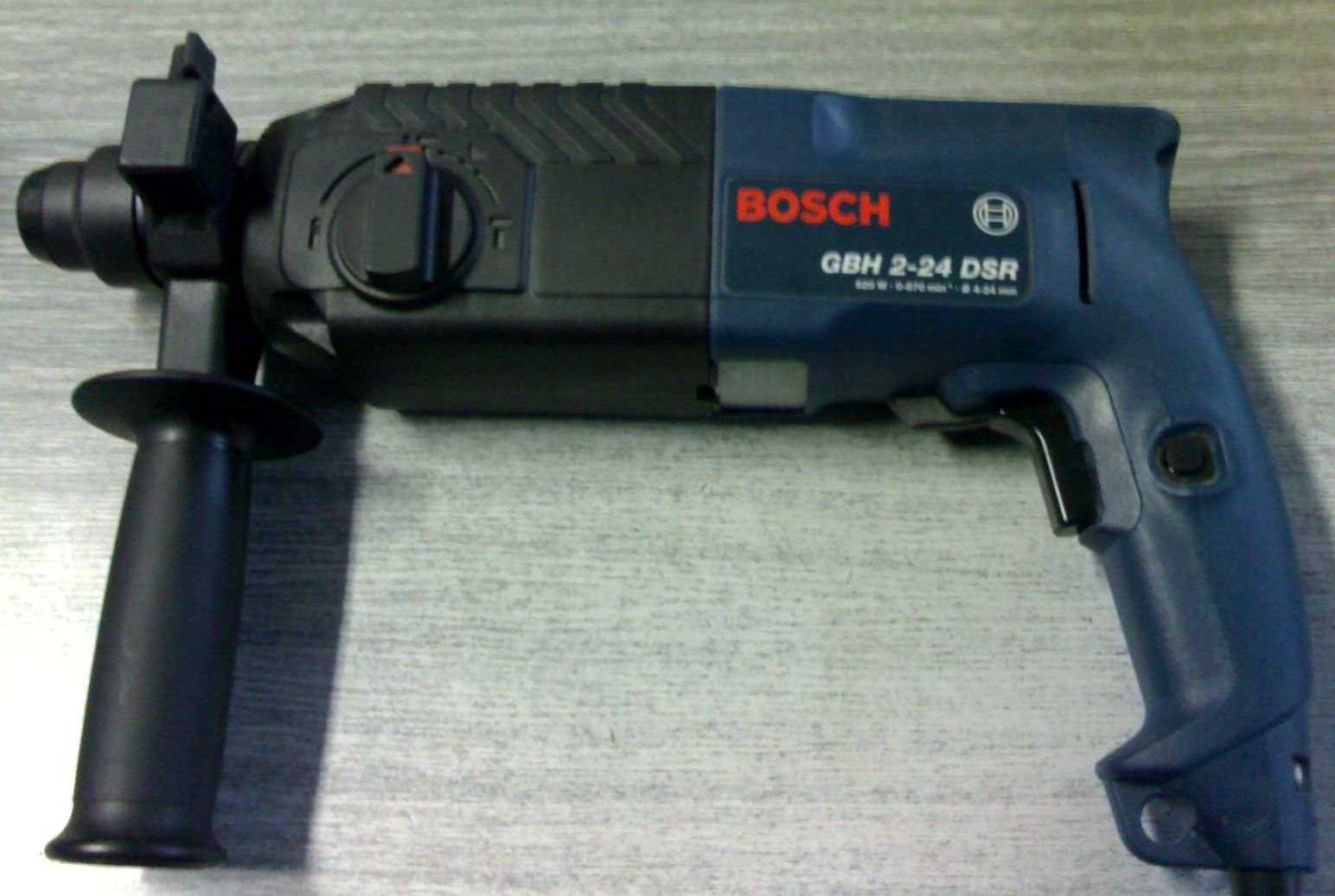 Bosch SDS plus bohrhammer